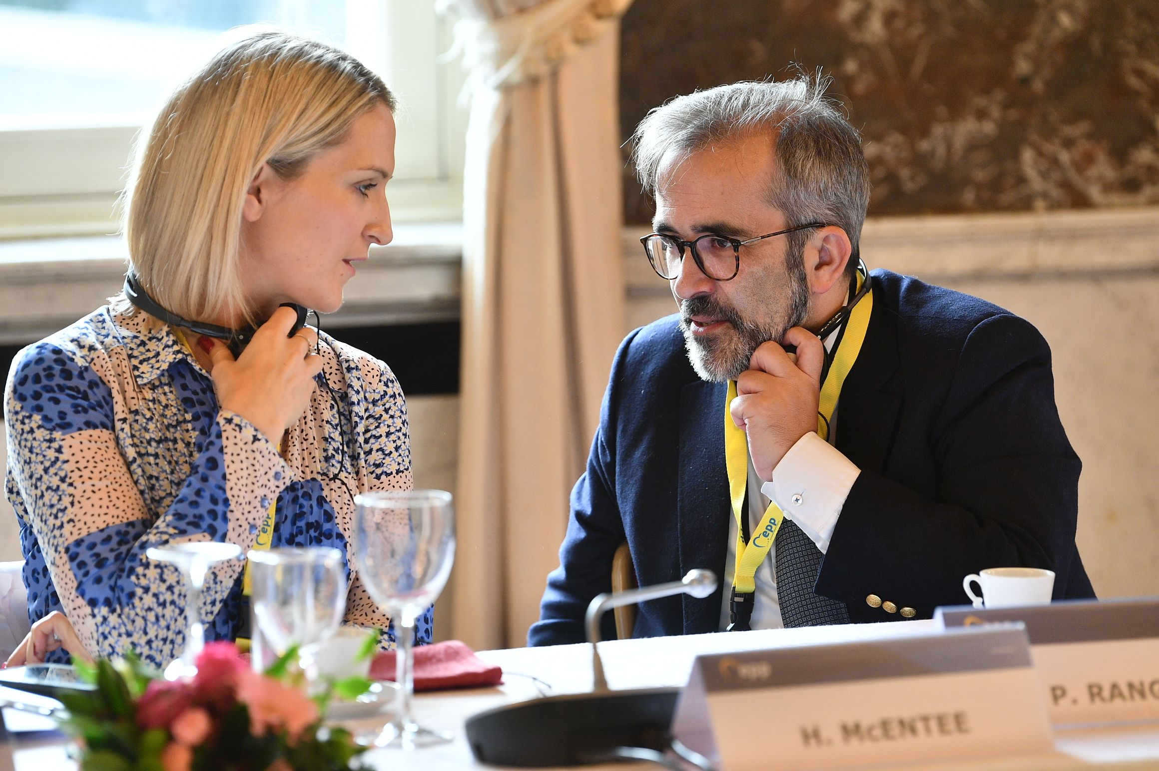 EPP Summit, Brussels, 12 December 2019